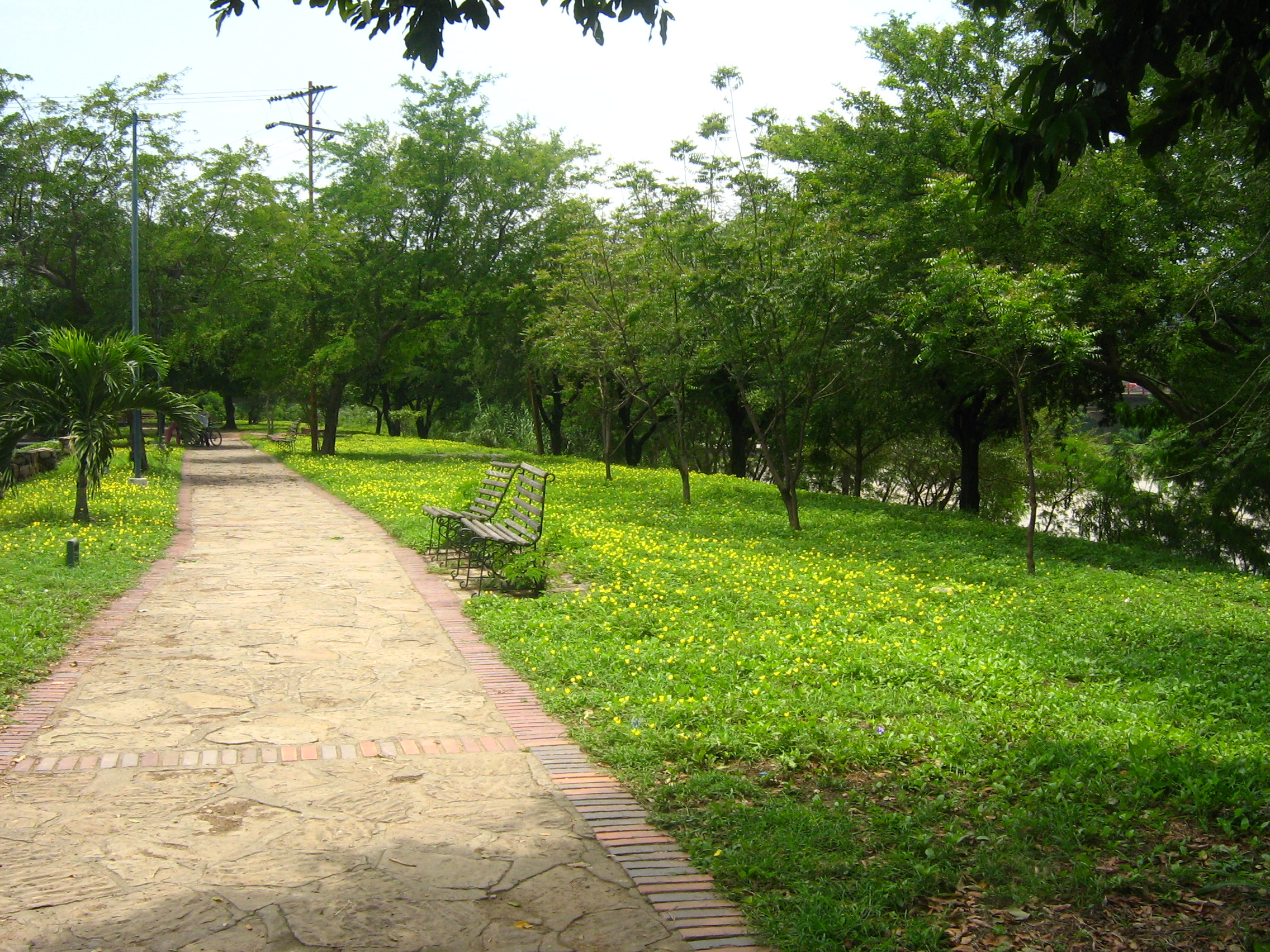 Cucuta (Colombia), para caminar al lado del rio pamplona